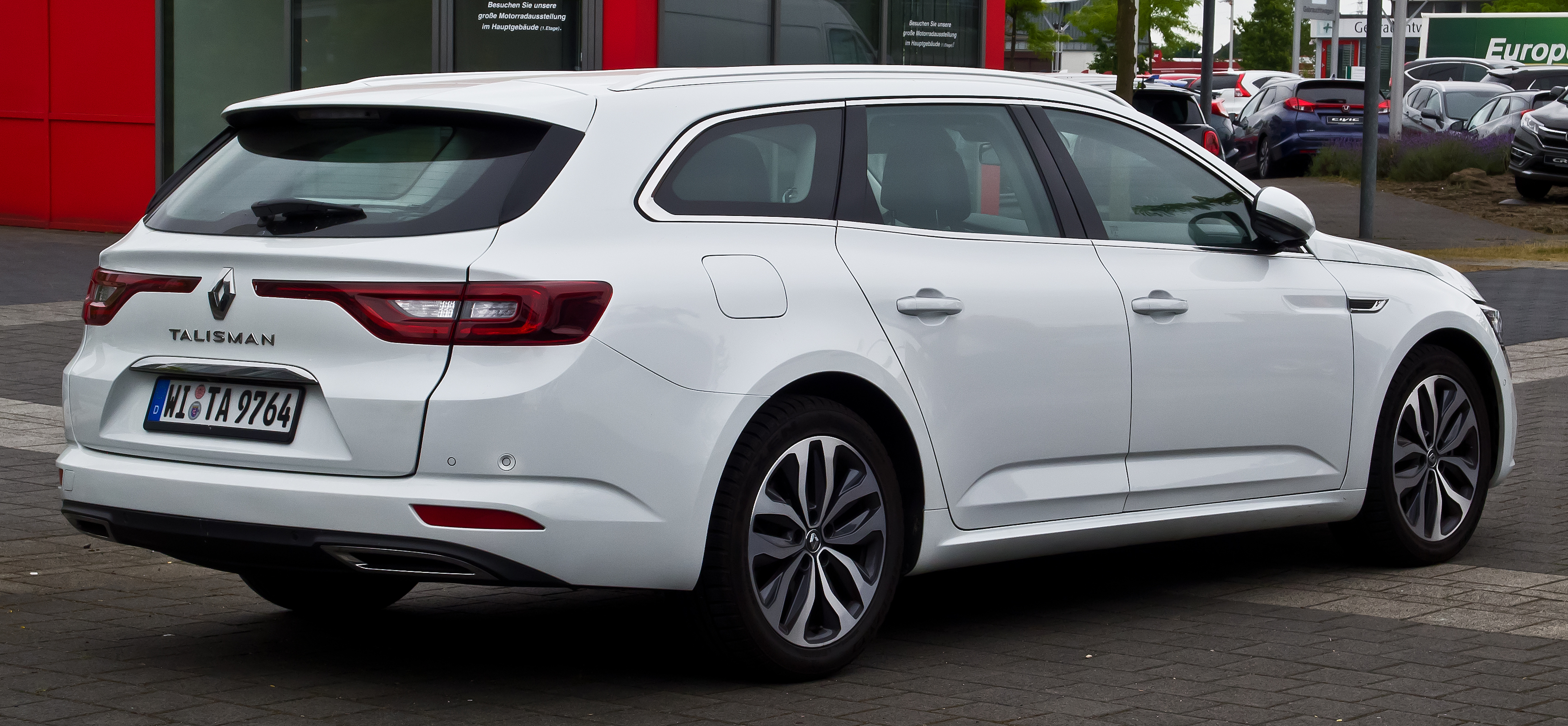 Renault Talisman Grandtour Intens ENERGY dCi 160 EDC